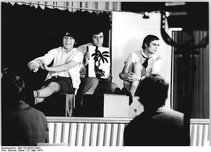 Dresden, Laienspielgruppe ADN-ZB Demme 22.3.74 Erfurt: Um die Teilnahme an den Arbeiterfestspielen bewerben sich vom 20. bis 24.3.74 in Erfurt 18 Laienkabaretts aus allen Bezirken der DDR. Die Kabarettisten der „Lachkarte“ vom VEB Kombinat Robotron in Dresden haben gute Aussichten, dieses Ziel zu erreichen. In einer Szene des Programms „Immer rin ins Gesicht“ wirken Rainer Borsche, Fredo Wendler und Norbert Adam (vlnr) mit.